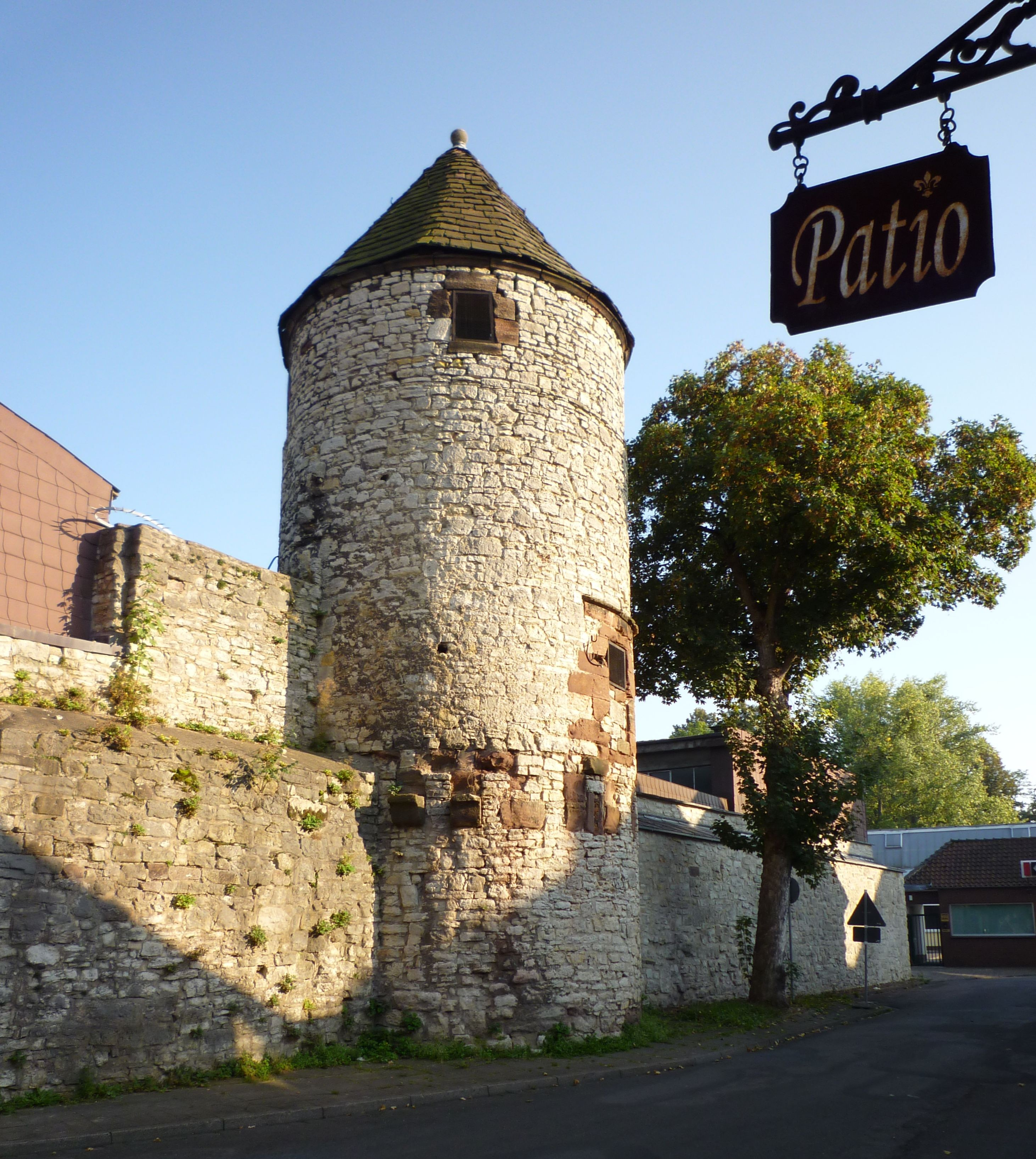 Einbeck - Rundturm der Stadtbefestigung